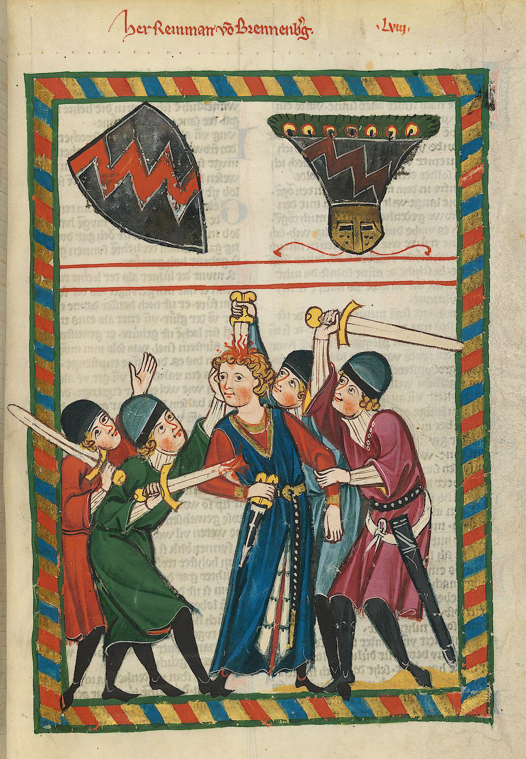 Codex Manesse, UB Heidelberg, Cod. Pal. germ. 848, fol. 188r: Herr Reinmar von Brennenberg